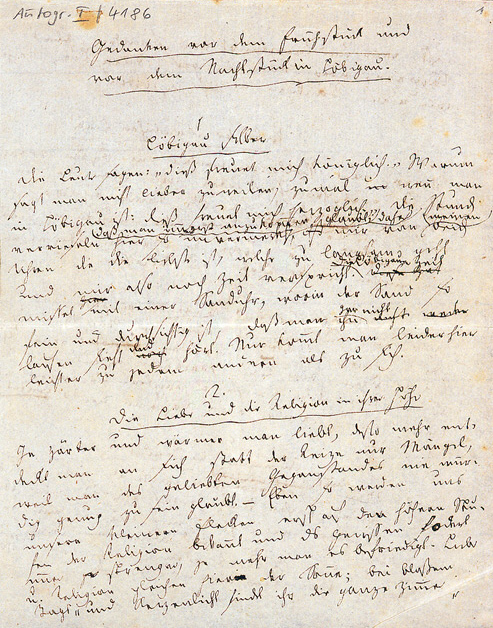 Gedanken vor dem Frühstück und vor dem Nachtstück in Löbigau, Manuskript, Gedruckt im "Taschenbuch für Damen auf das Jahr 1821"